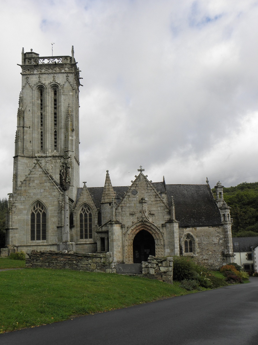 Vue méridionale de la chapelle de Saint-Herbot (29).